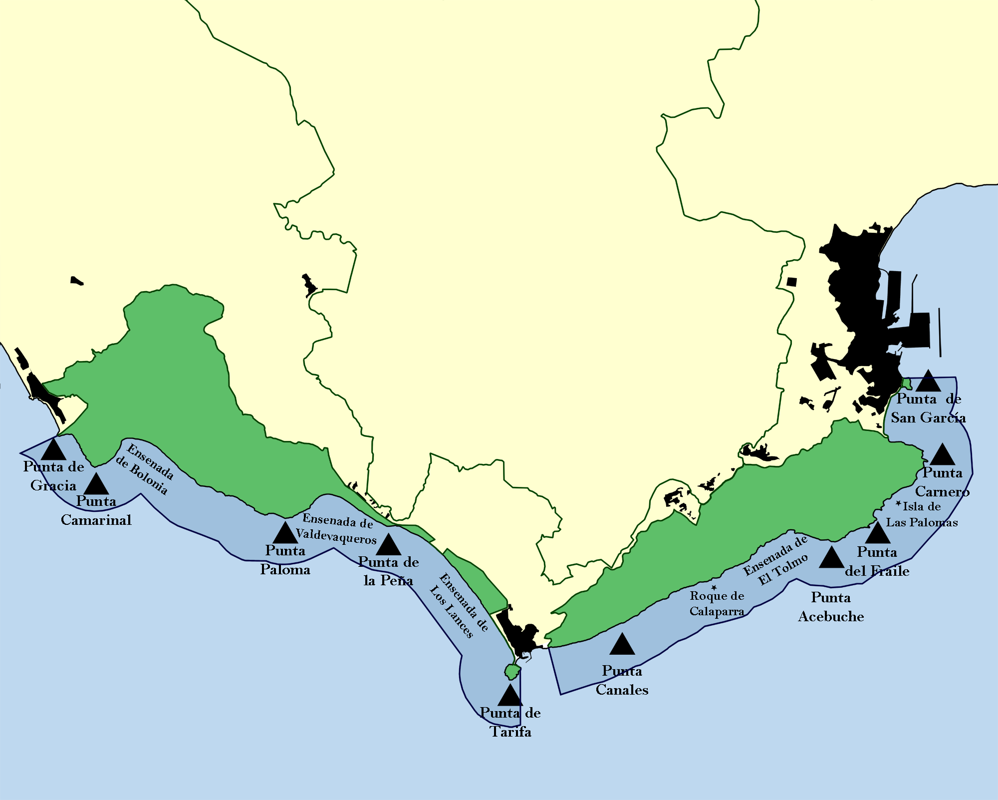 Mapa de la toponimia costera del Parque natural del Estrecho.